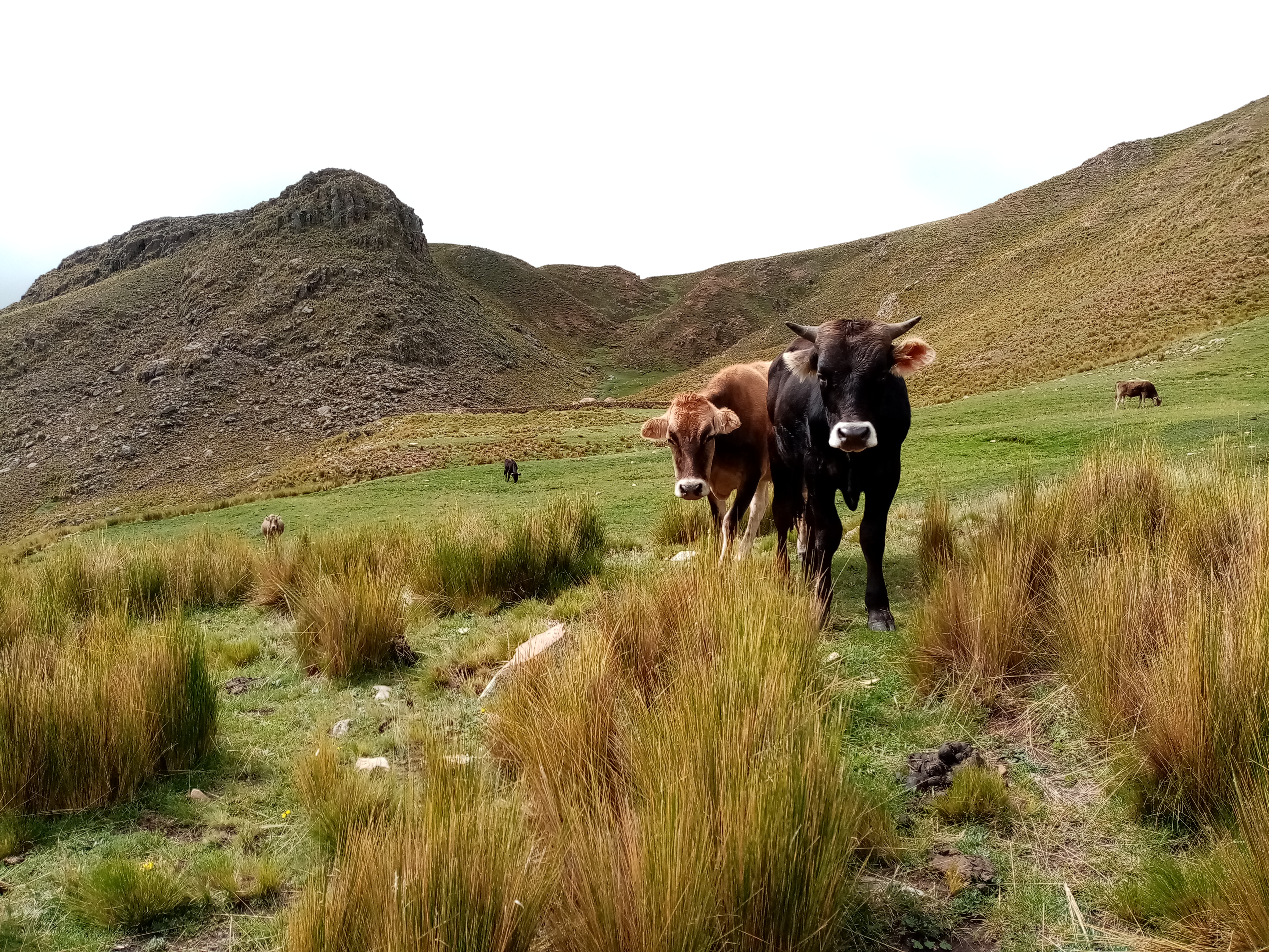 Zona apto para la ganaderia